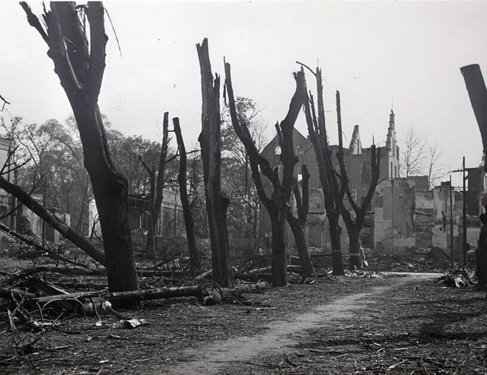 Der östliche Teil der Seufzerallee nach dem Bombenangriff am 23. September 1944, links die Ruinen des Malkastens